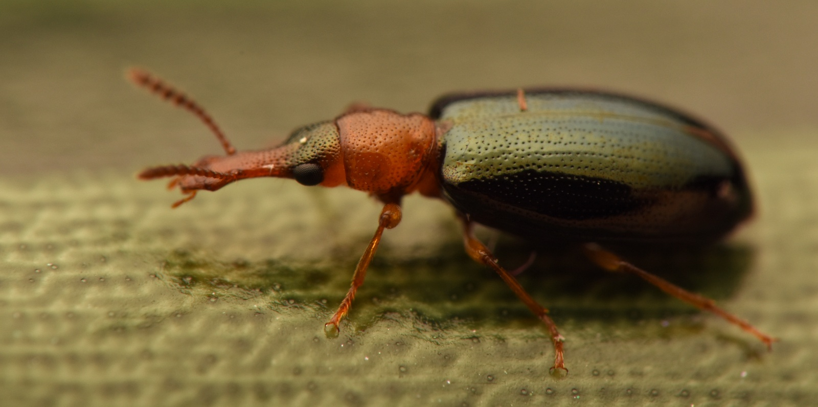 Salpingus ruficollis​